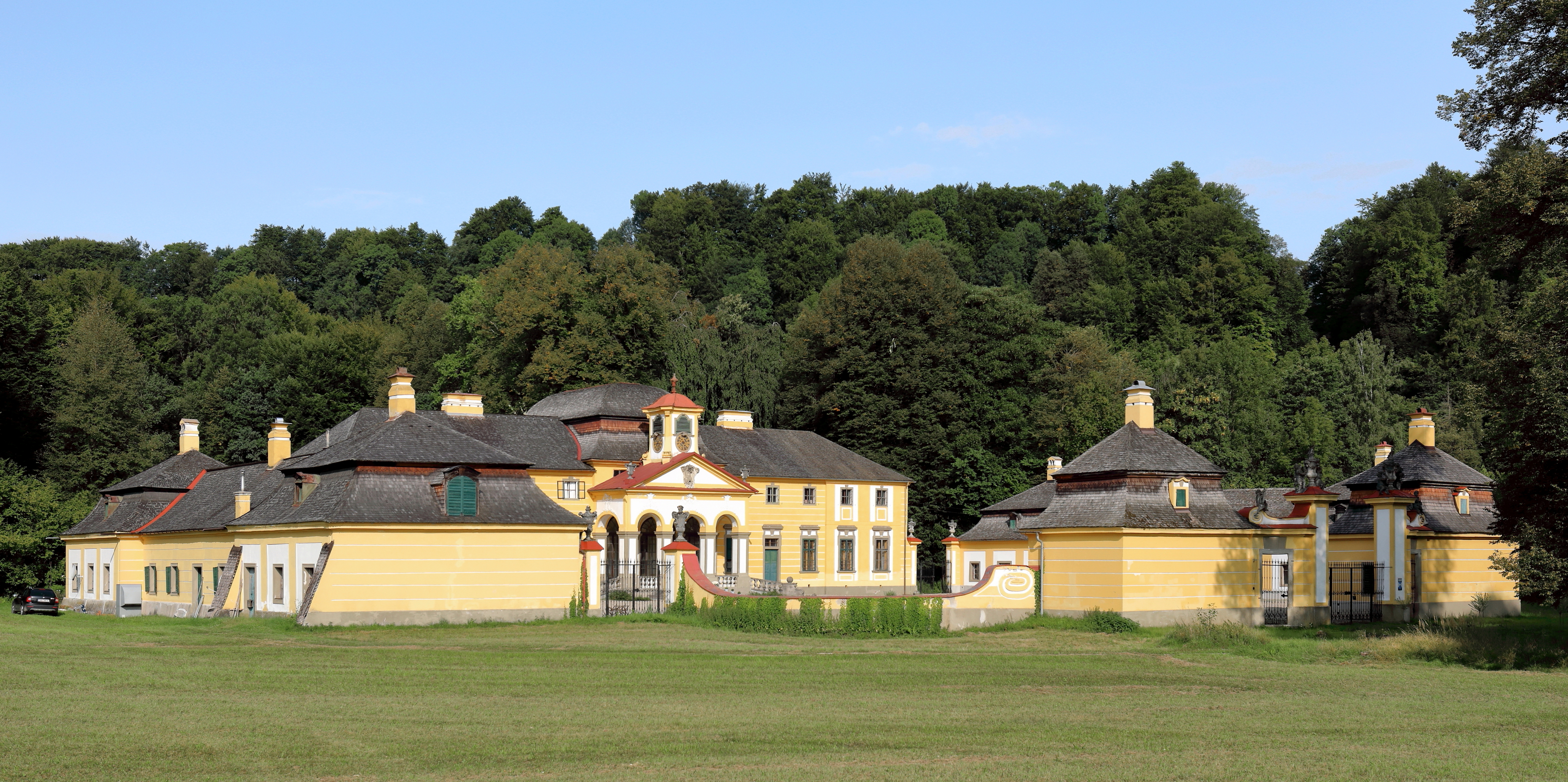 Das Schloss Neuwartenburg in der oberösterreichischen Marktgemeinde Timelkam.Das spätbarocke Schloss umfasst das Haupthaus und einen von zwei Seitentrakten und einem Portal mit zwei Torpavillons Richtung Osten eingefassenen Ehrenhof. Das Schloss ließ Johann Albert Graf Saint-Julien-Wallsee (1673–1766) von 1730 bis 1732 von dem Wiener Architekten Anton Erhard Martinelli errichten.